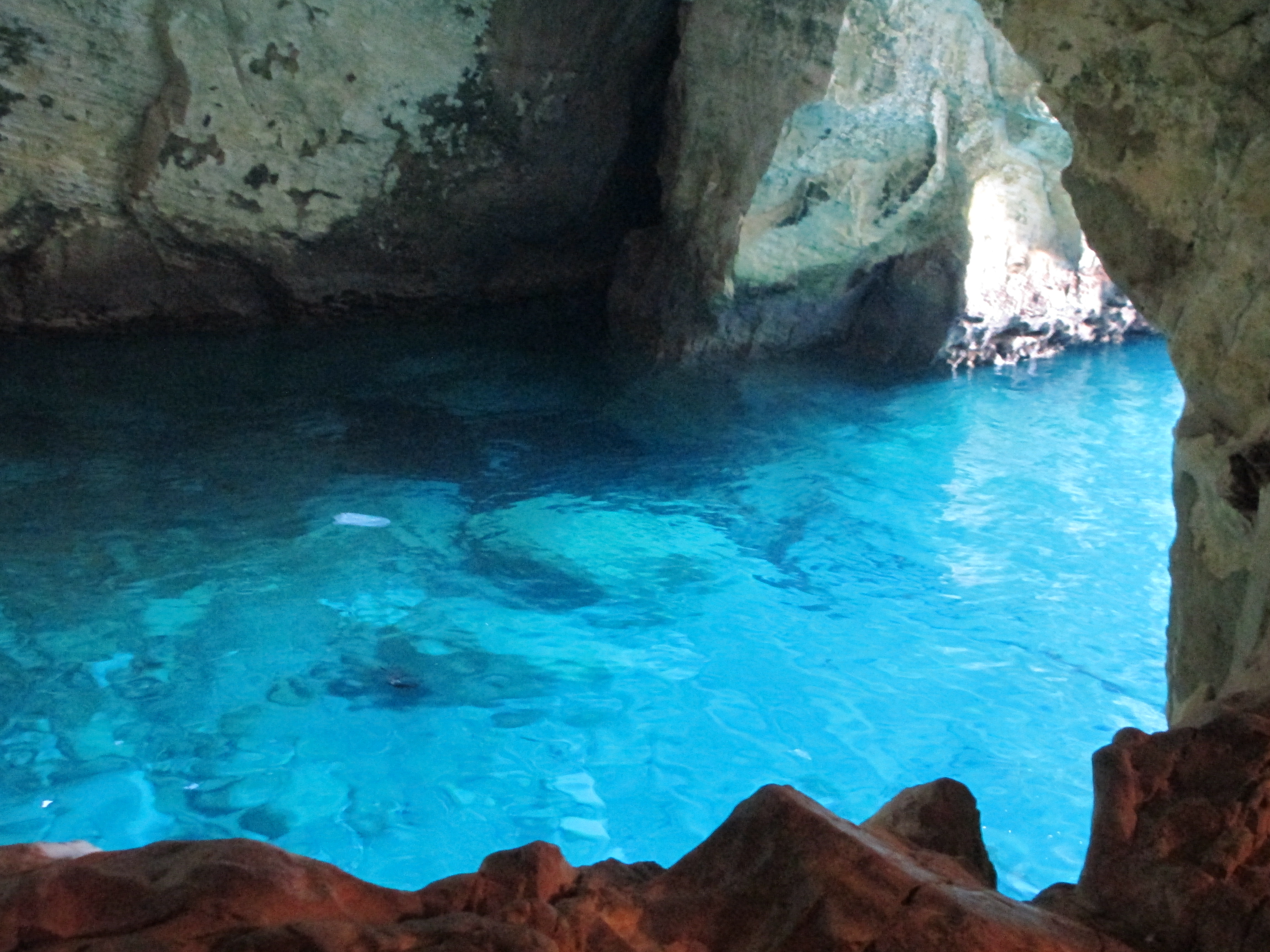 נקרה בראש הנקרה